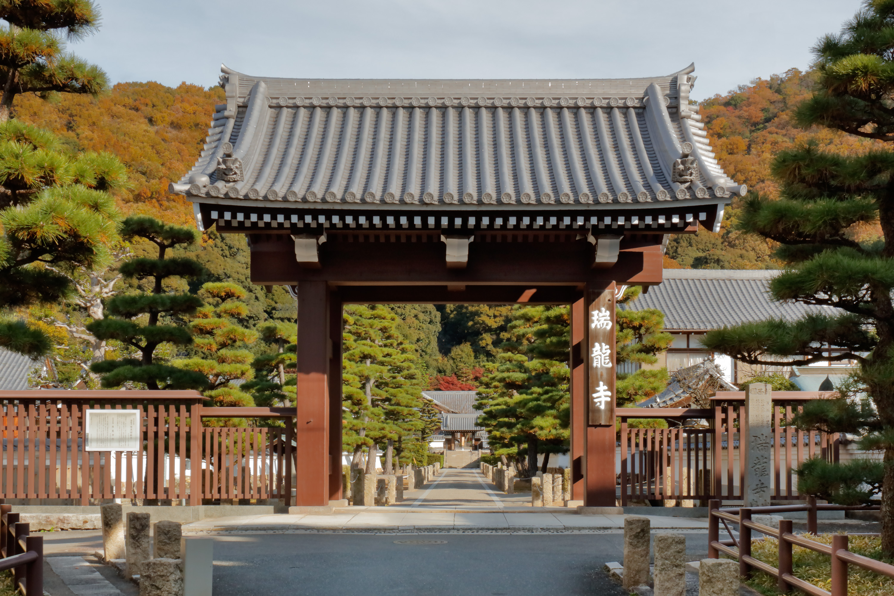 瑞龍寺 (岐阜市)-総門